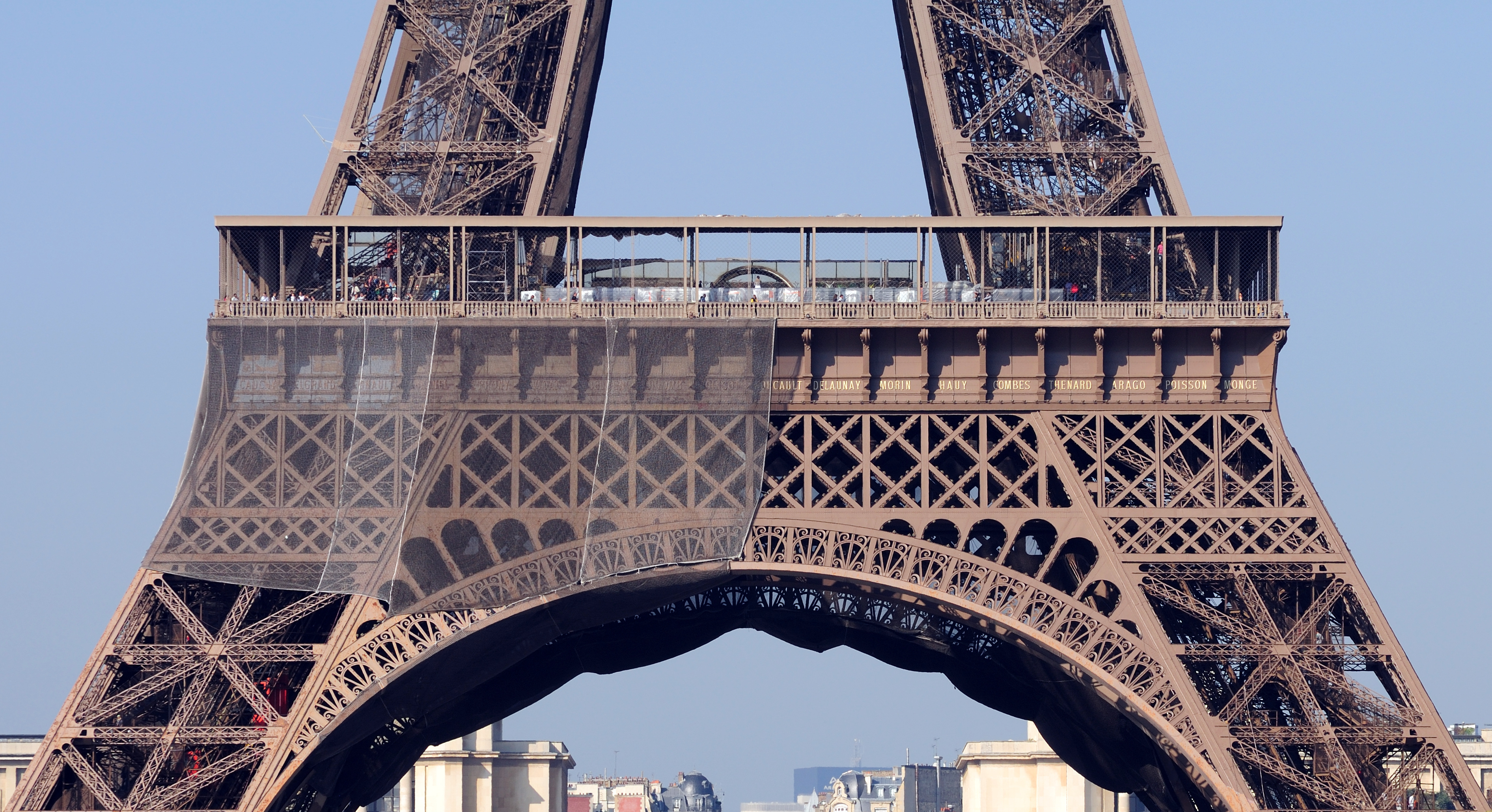 Paris: Erste Plattform des Eiffelturms